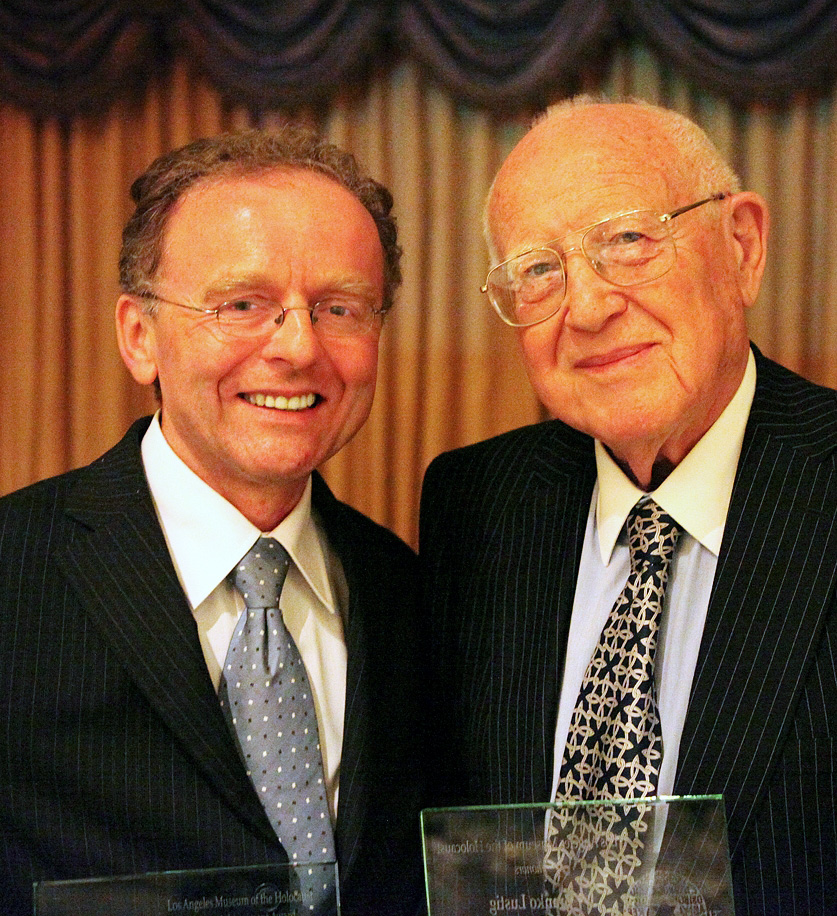 Andreas Maislinger und Branko Lustig beim 2nd Annual Dinner des LA Museum of the Holocaust